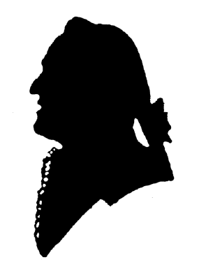 Samuel Collenbusch (1724–1803); zeitgenössischer Scherenschnitt, Original Stadtarchiv Schwelm